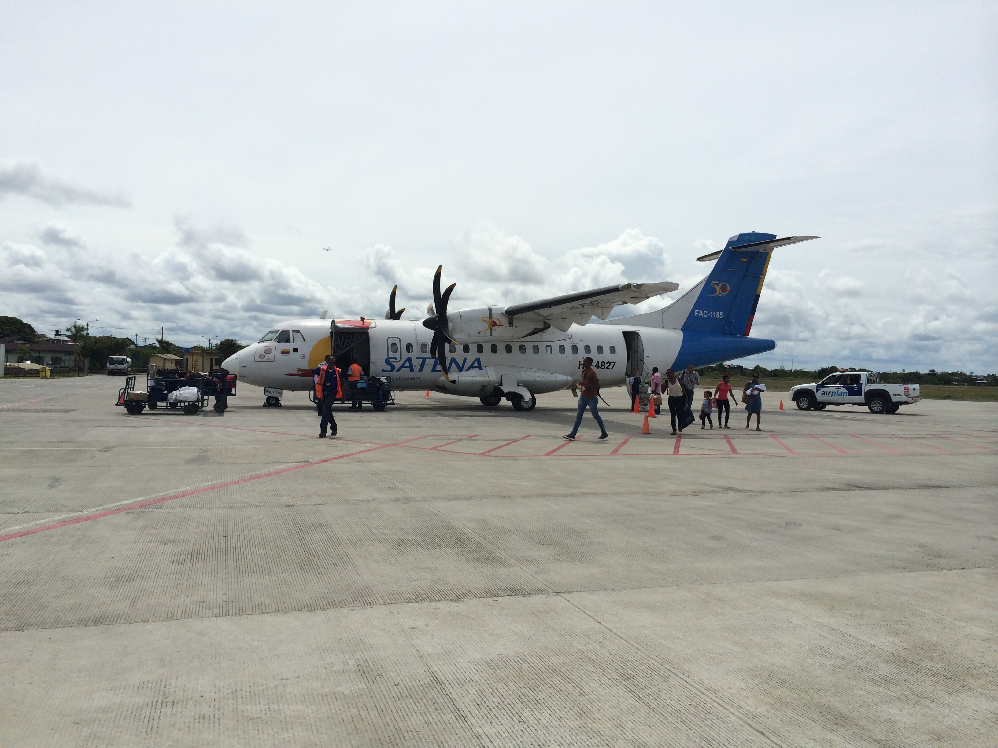 Aeropuerto el Caraño